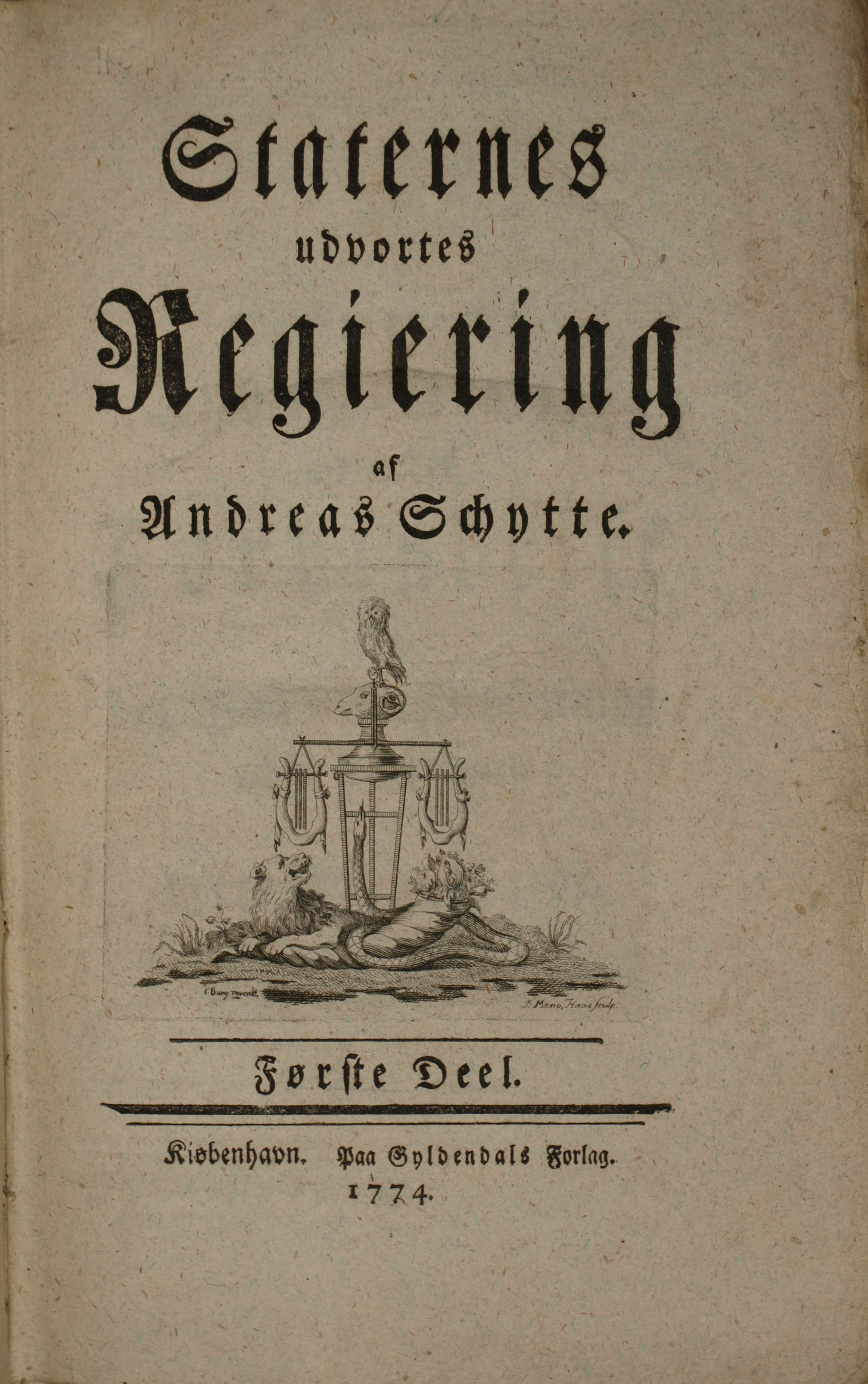 Titelbladet til Andreas Schyttes Staternes udvortes Regiering - Første Deel fra 1774.